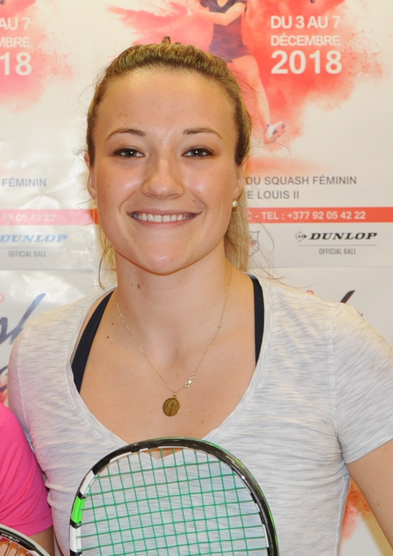 Olivia Fiechter, Monte-Carlo Squash Classic 2018